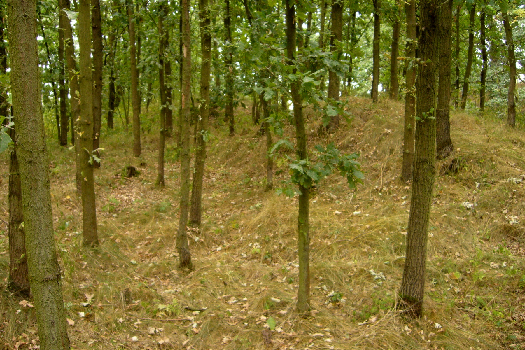 Východní strana jádra s valem